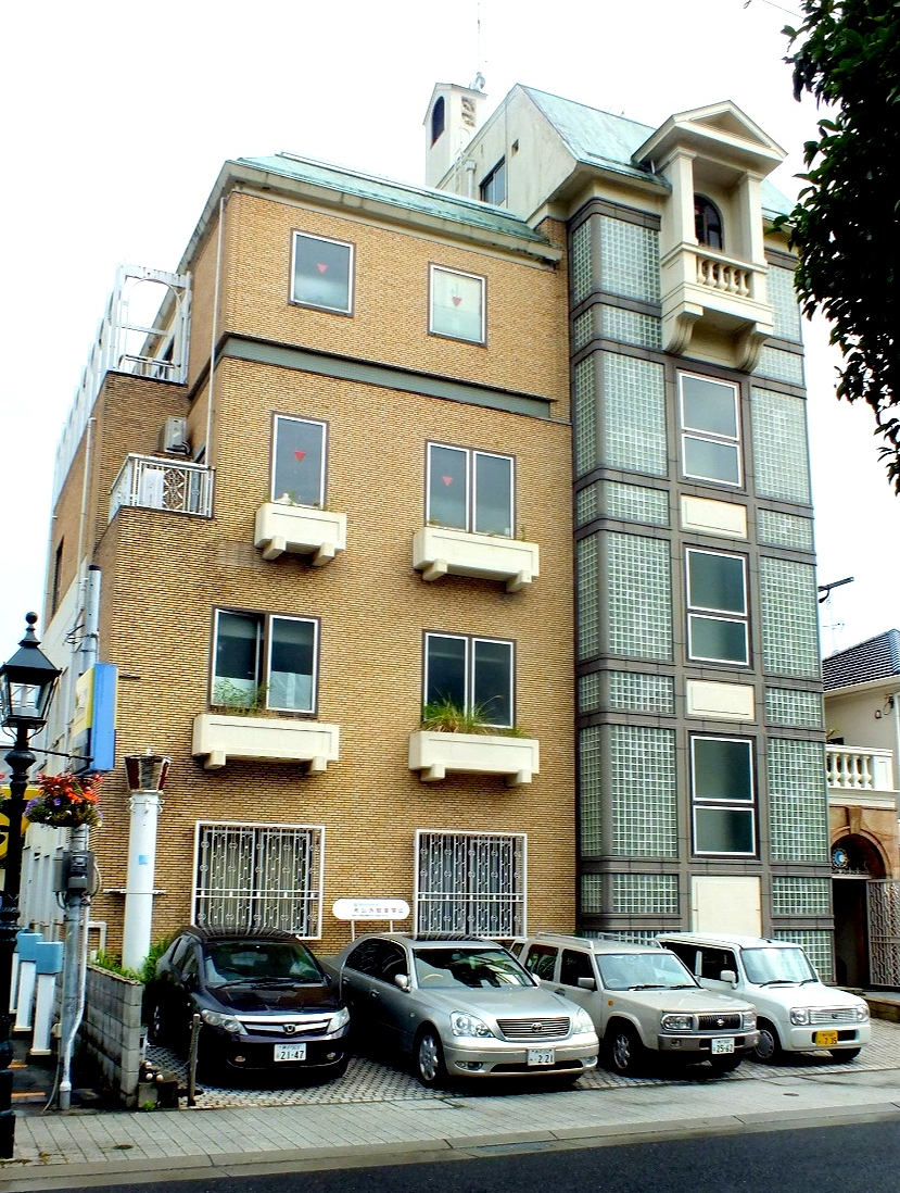 TAKAHASHI PEARL CO.,LTD.Building 〒650-0003 兵庫県神戸市中央区山本通1丁目6番20号 株式会社タカハシパール